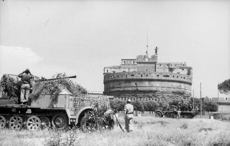 Information added by Wikimedia users.* Automezzi semicingolati tedeschi della difesa antiaerea sul fianco di Castel Sant'Angelo a Roma, dove oggi inizia via della Conciliazione, nel 1944